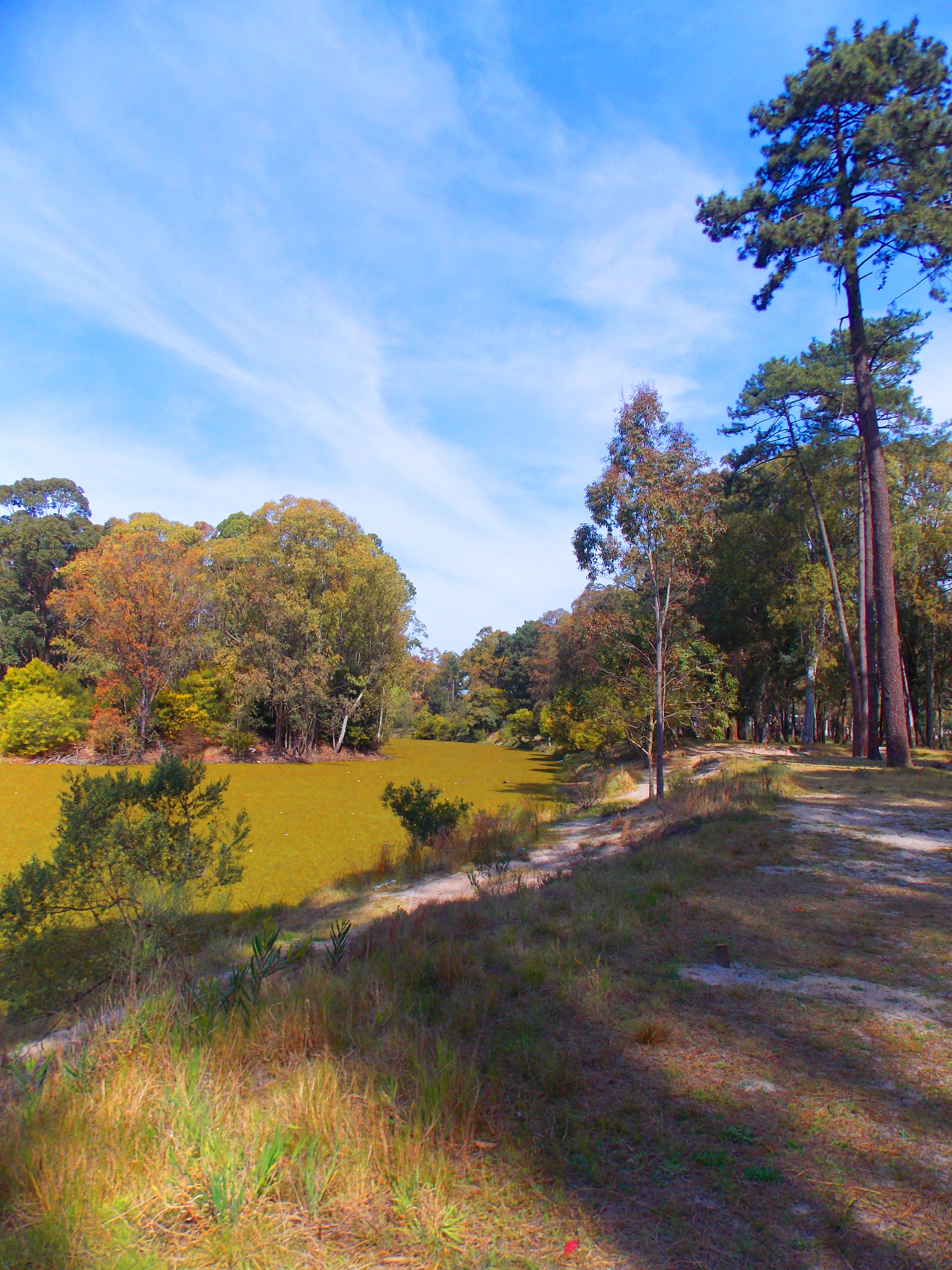 Parque Franklin Delano Roosevelt. Ubicada en el departamento de Canelones